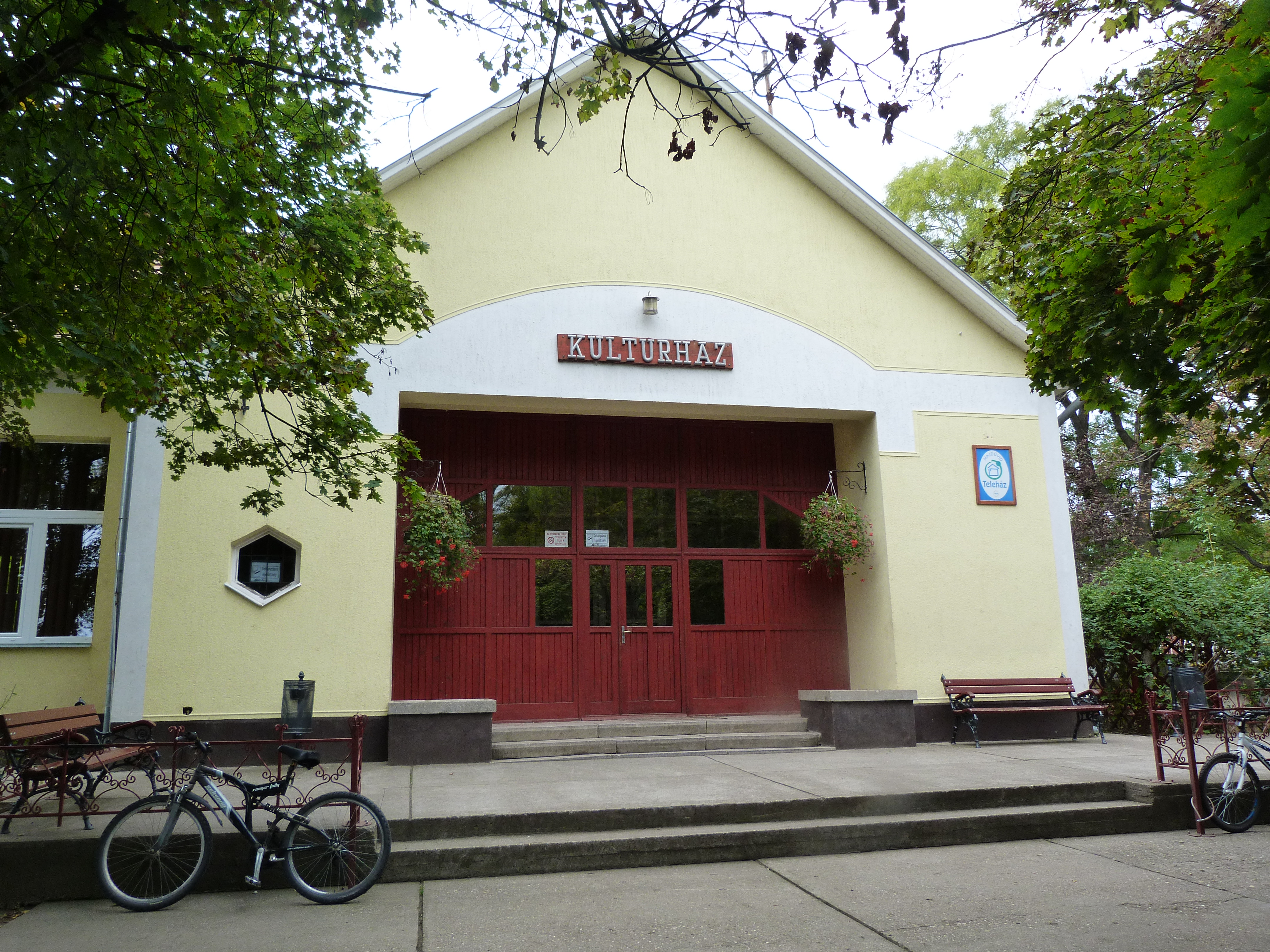 A felvételek 2013. szeptember 24 -én készültek Hajdúviden. ©© Derzsi Elekes Andor, Budapest, 2013, You are authorised to use these photos and vids under Creative Commons – even for commercial, for profit purposes. Photos must be attributed to Derzsi Elekes Andor. All of the photos and vids in the Metapolisz DVD line are under Creative Commons and can be used even for commercial – for profit – purposes. Recommended Citation Derzsi Elekes Andor: Metapolisz DVD line